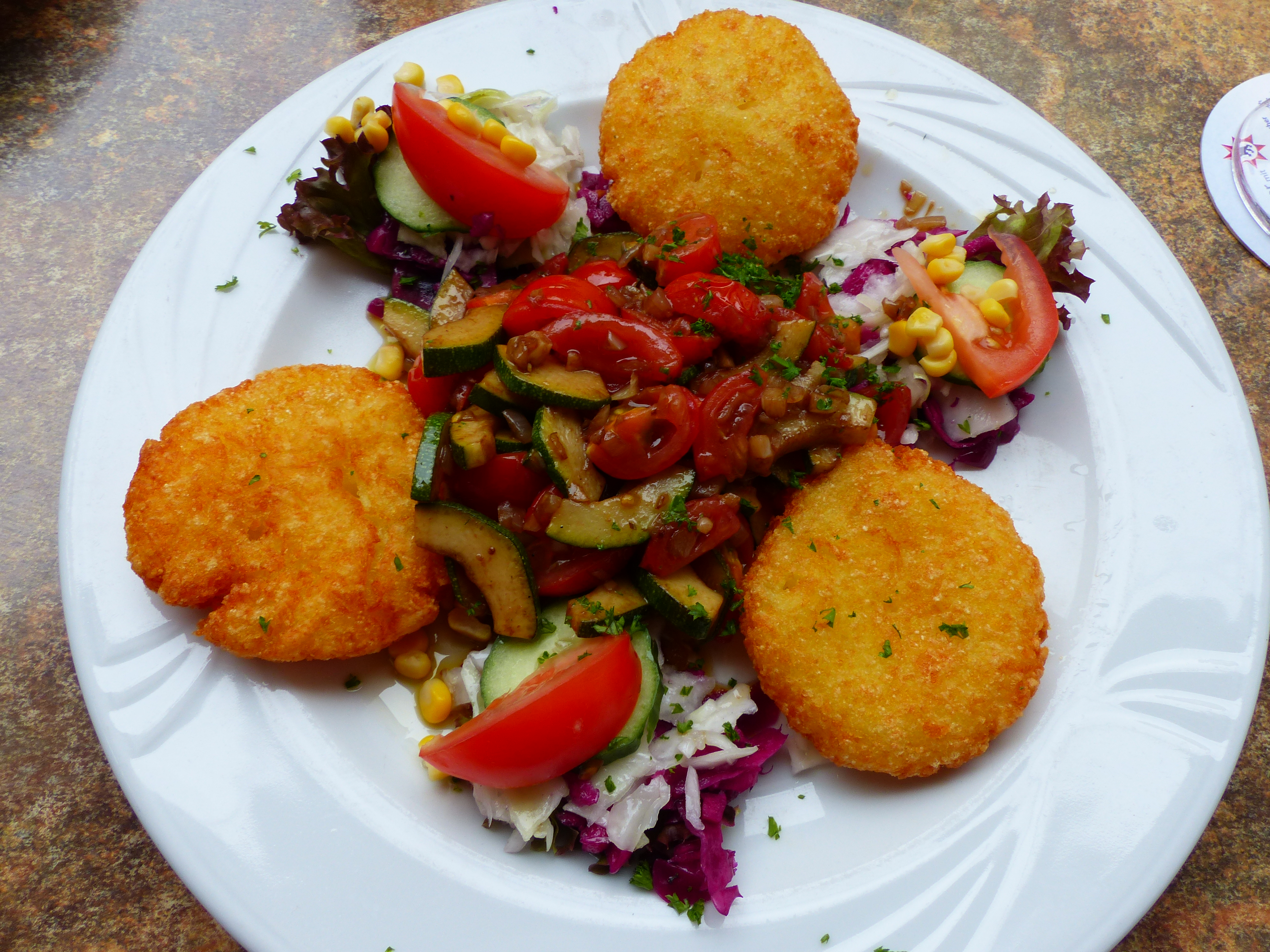 Gebackene Kloßscheiben mit Gemüse, Köstritzer Schwarzbierhaus, Weimar